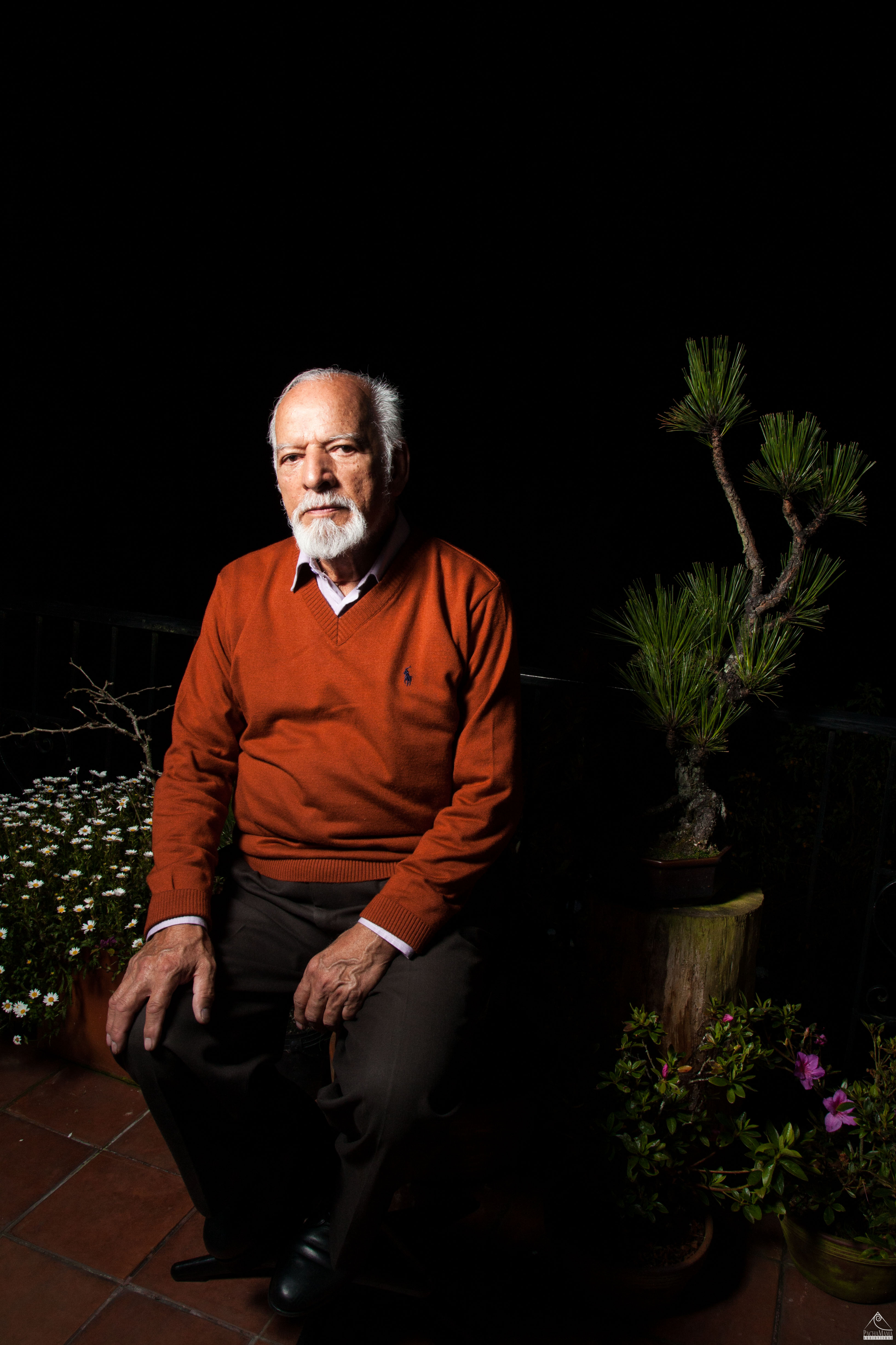 Jorge Riveros, Pintor Colombiano